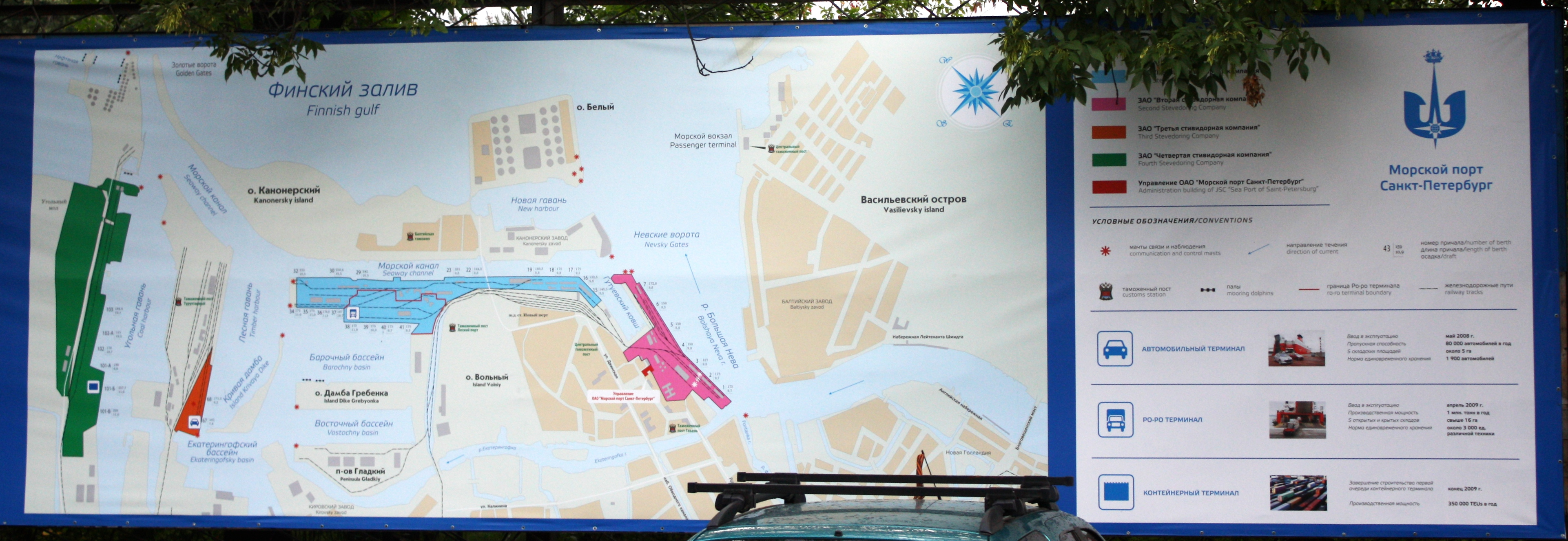 Port of Sain Petersburg Russia 2009